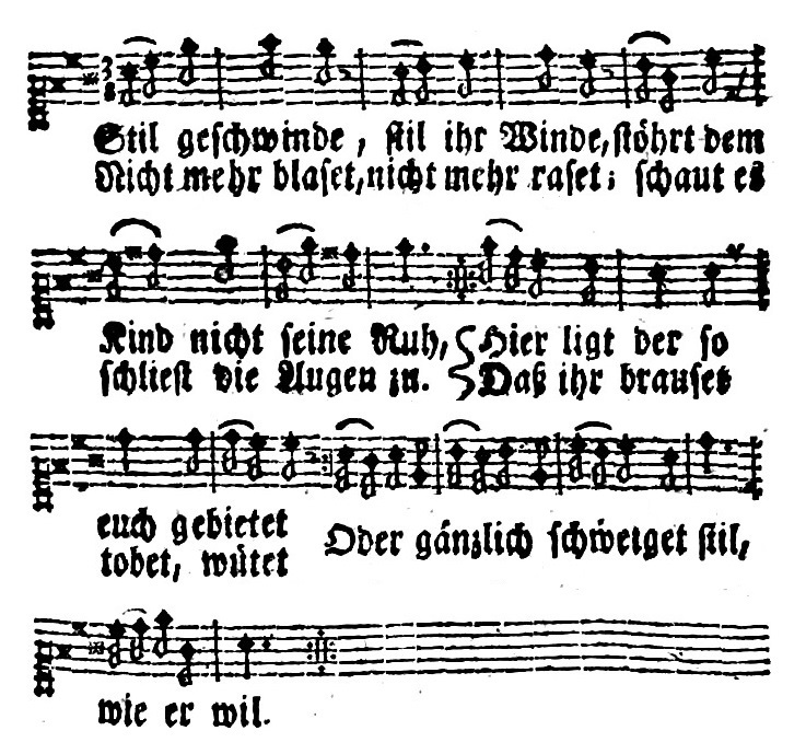 Still geschwinde, Weihnachtslied in Heinrich Lindenborns Gesangbuch Tochter Sion (1741, 2/1755), Vorlage für Johannes von Geissels Erde, singe; Melodie